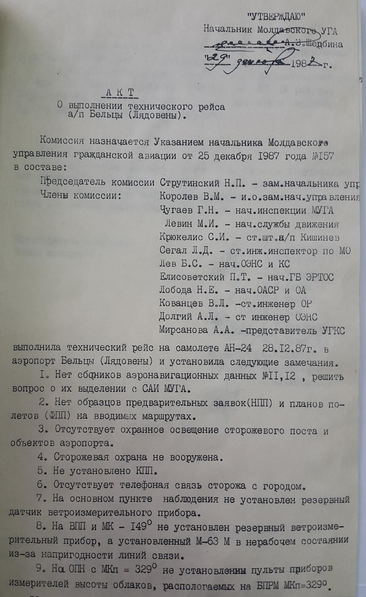 Акт о выполнении первого технического рейса в аэропорту Бельцы-Лядовены